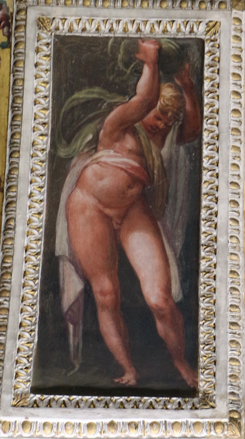 Allegoria del temperamento Collerico secondo la dottrina dei quattro umori, affresco di Jacopo Zucchi e del Poppi sul soffitto dello studiolo di Francesco I nel Palazzo Vecchio a Firenze